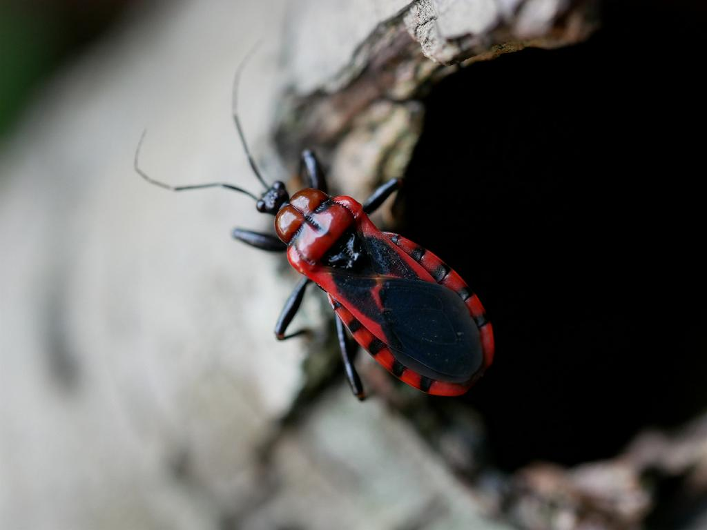 2019/05/05 和歌山県田辺市：Tanabe City. Wakayama Pref. Japan